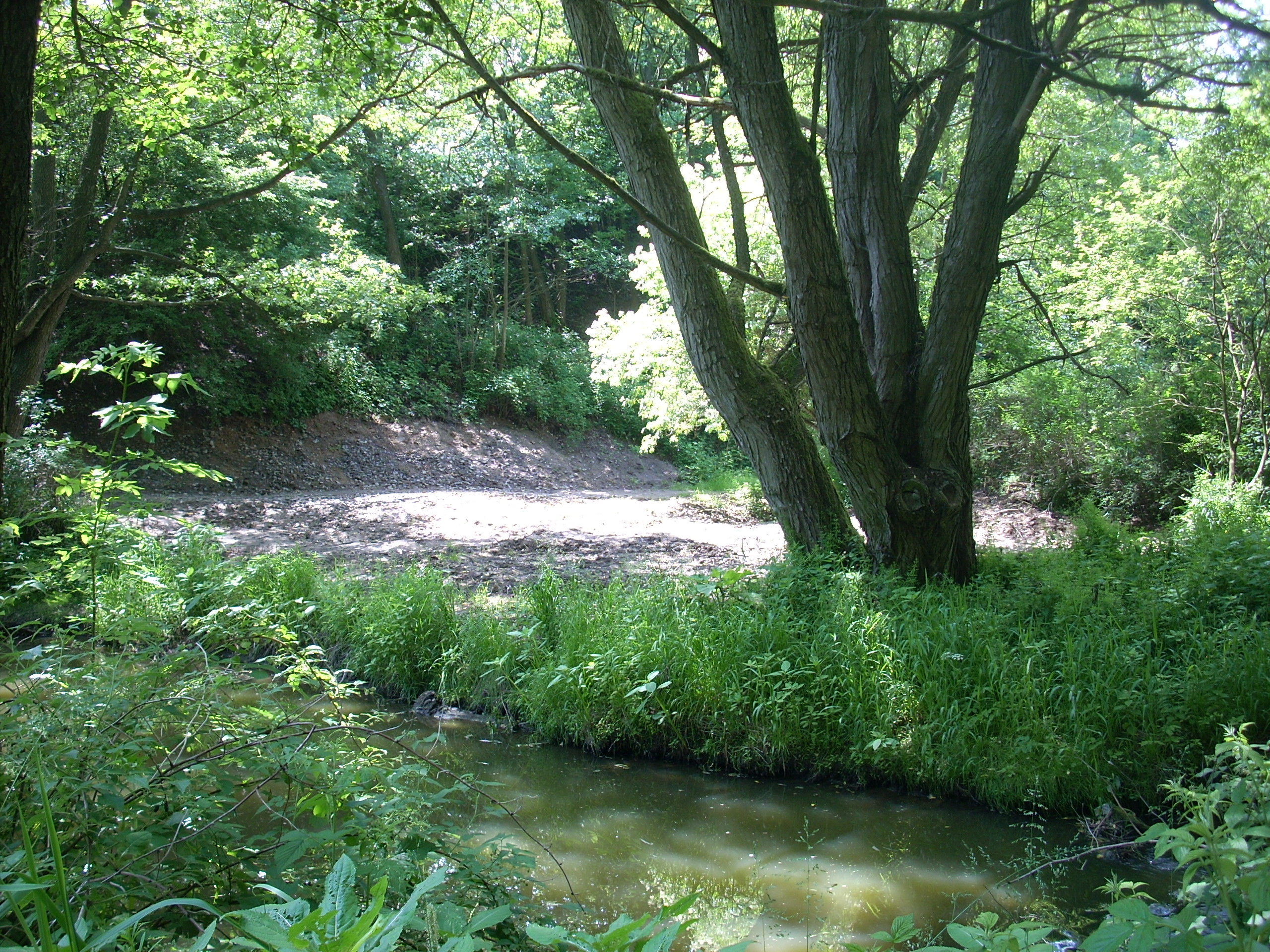 Dobronín, lokalita u viaduktu